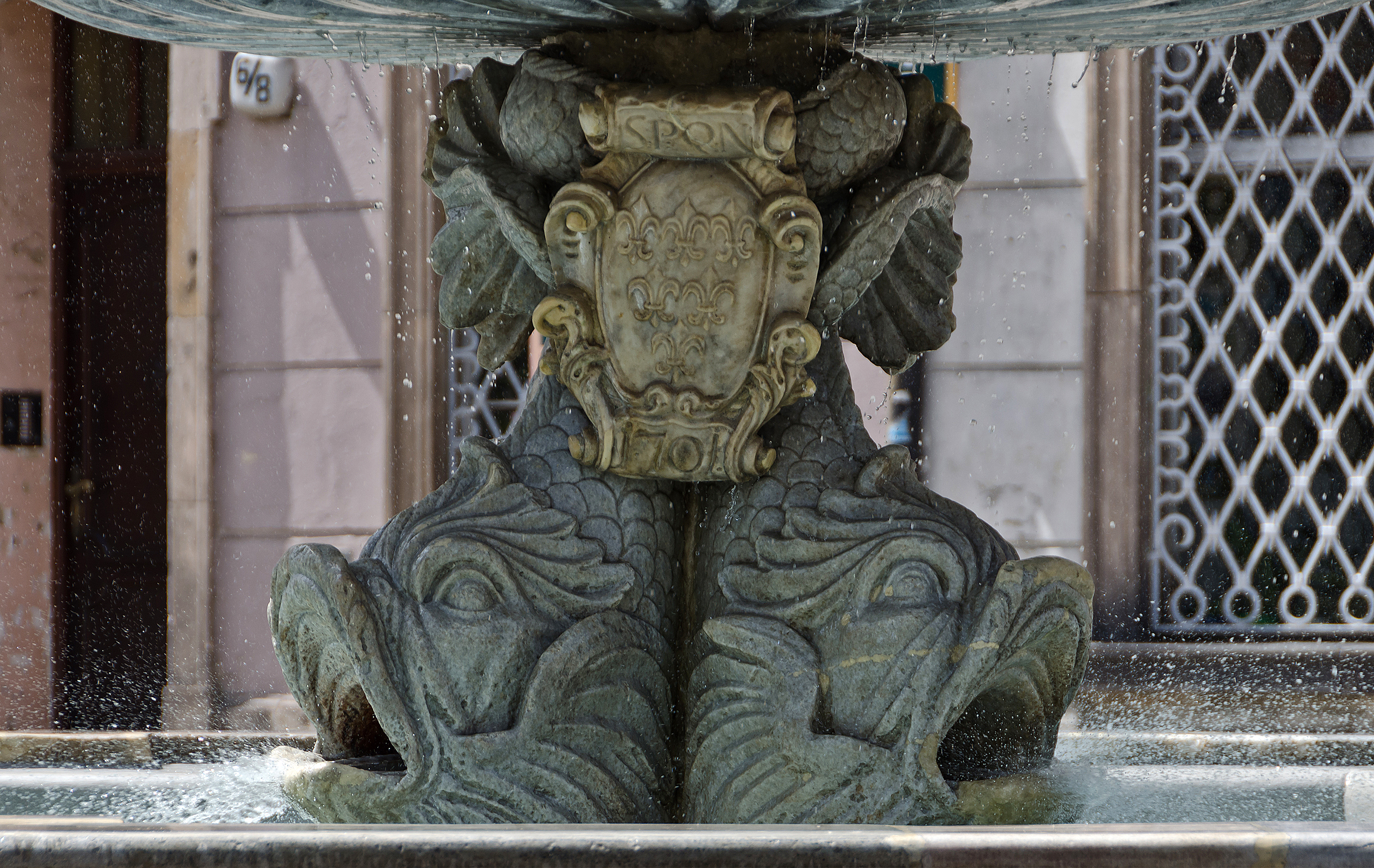 Nysa, Stare Miasto